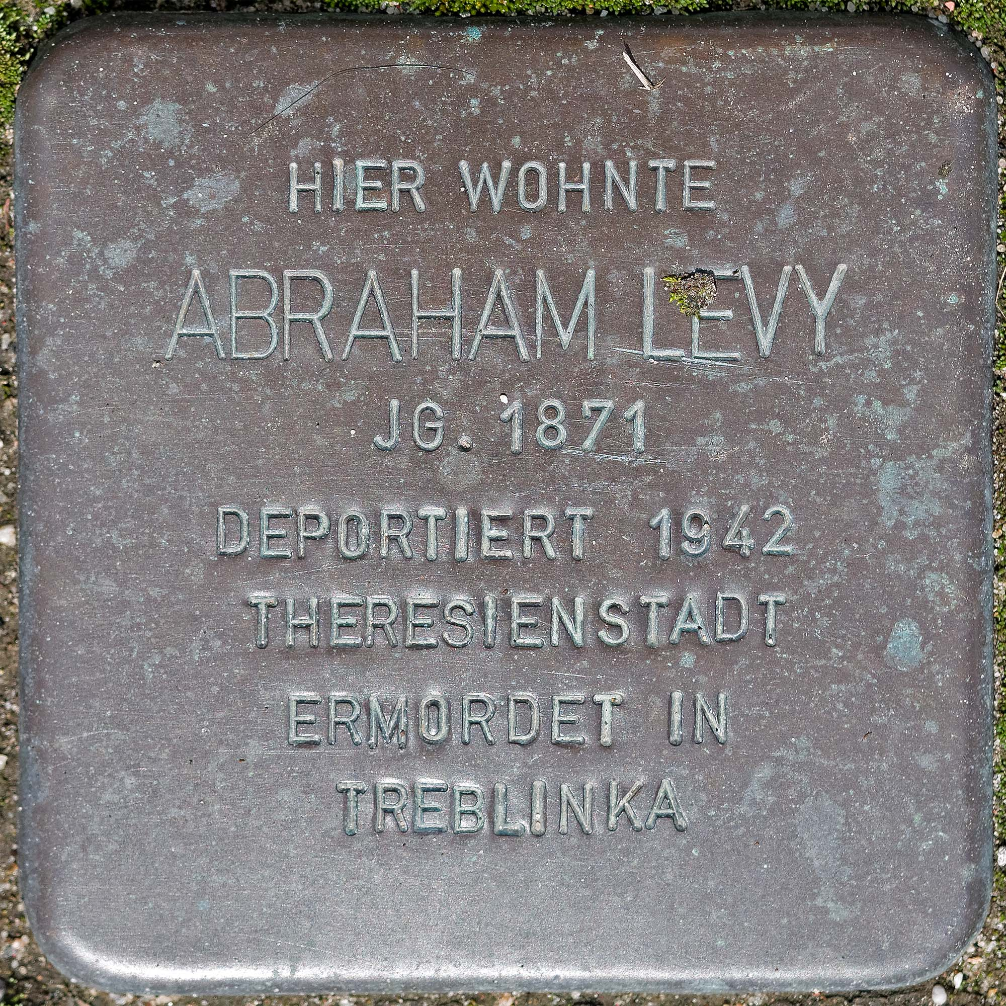 Stolperstein Nettetal: Abraham Levy